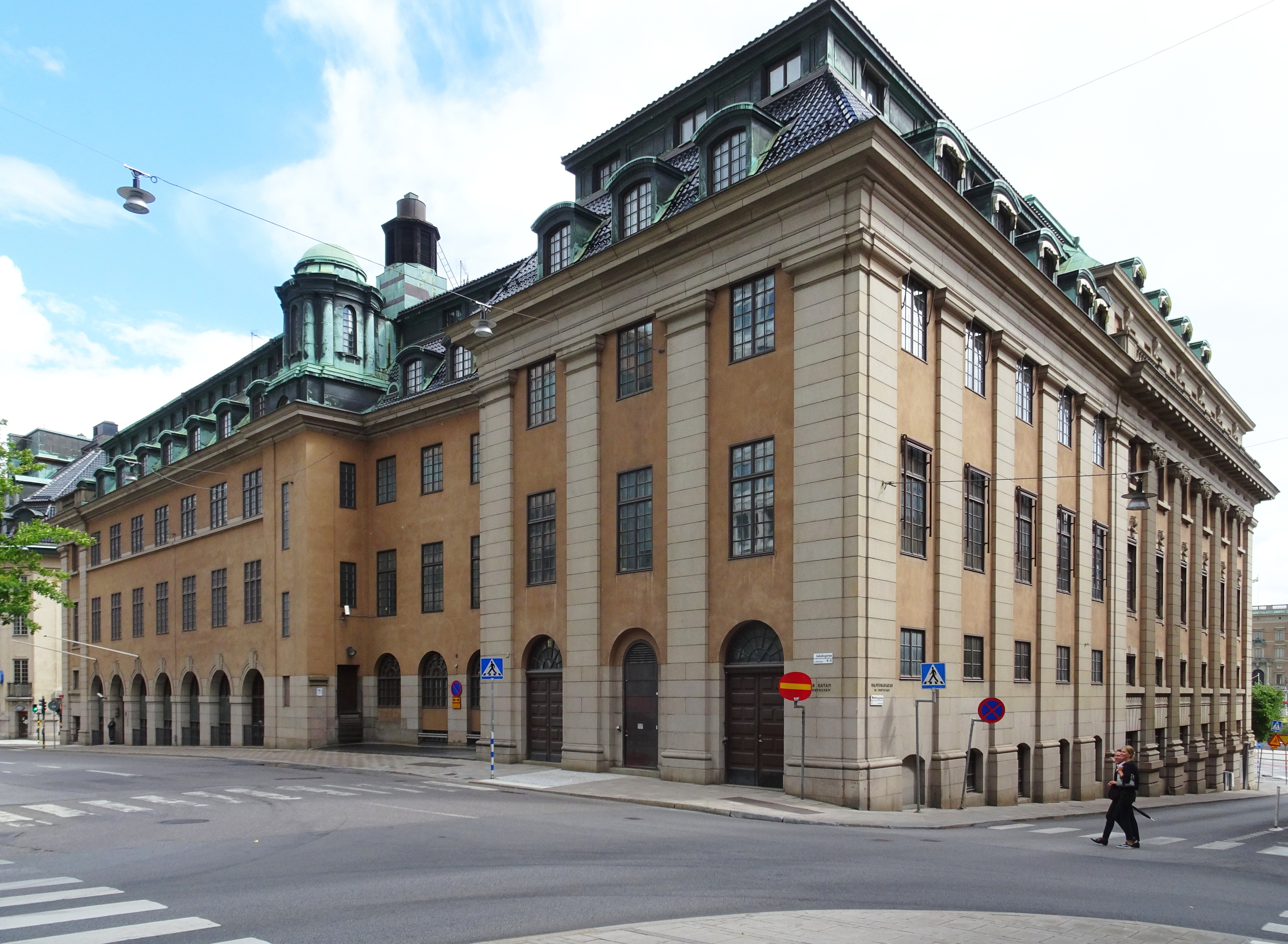 Före detta Skandinaviska Bankens palats, Kvarteret Vinstocken.